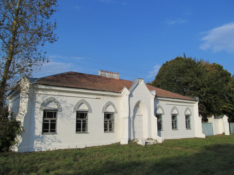 Паськава Горка. Паштовая станцыя.